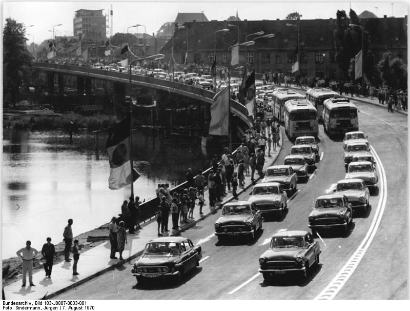 Wismar, neue Spannbetonbrücke Zentralbild Sindermann 7.8.70 Wismar: Längste Spannbetonbrücke der DDR übergeben- Die 400 Meter lange Brücke ist Teil einer neuen Hochstraße, die viersppurig auf mehr als einem Kilometer Länge über den "Mühlenteich" und vielbenutzte Eisenbahngleise an der Einfahrt zur Werft - und Hafenstadt führt. -Reger Betrieb nach der Freigabe am 7.8.70.